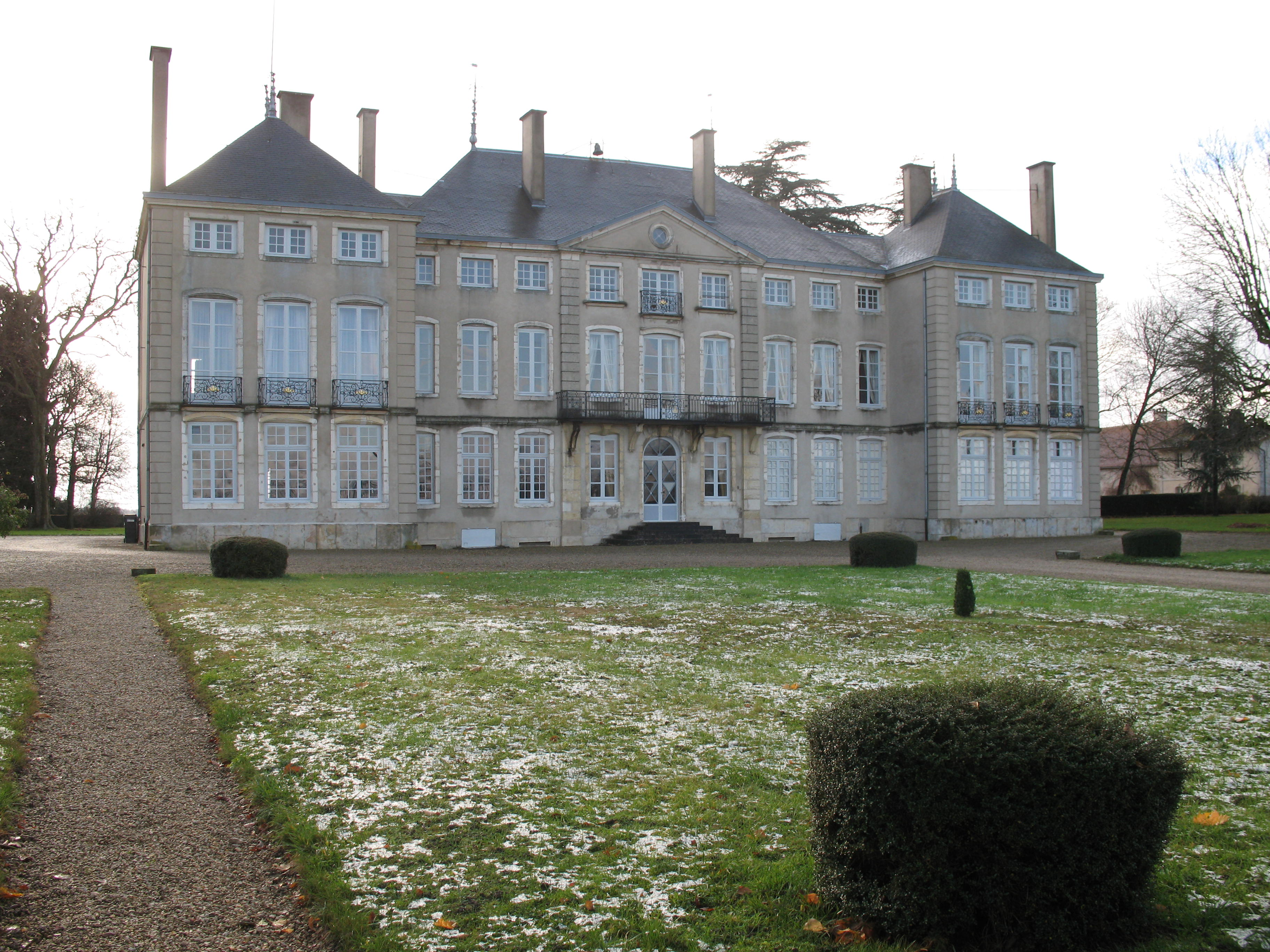 Château de Demigny en Saône-et-Loire.